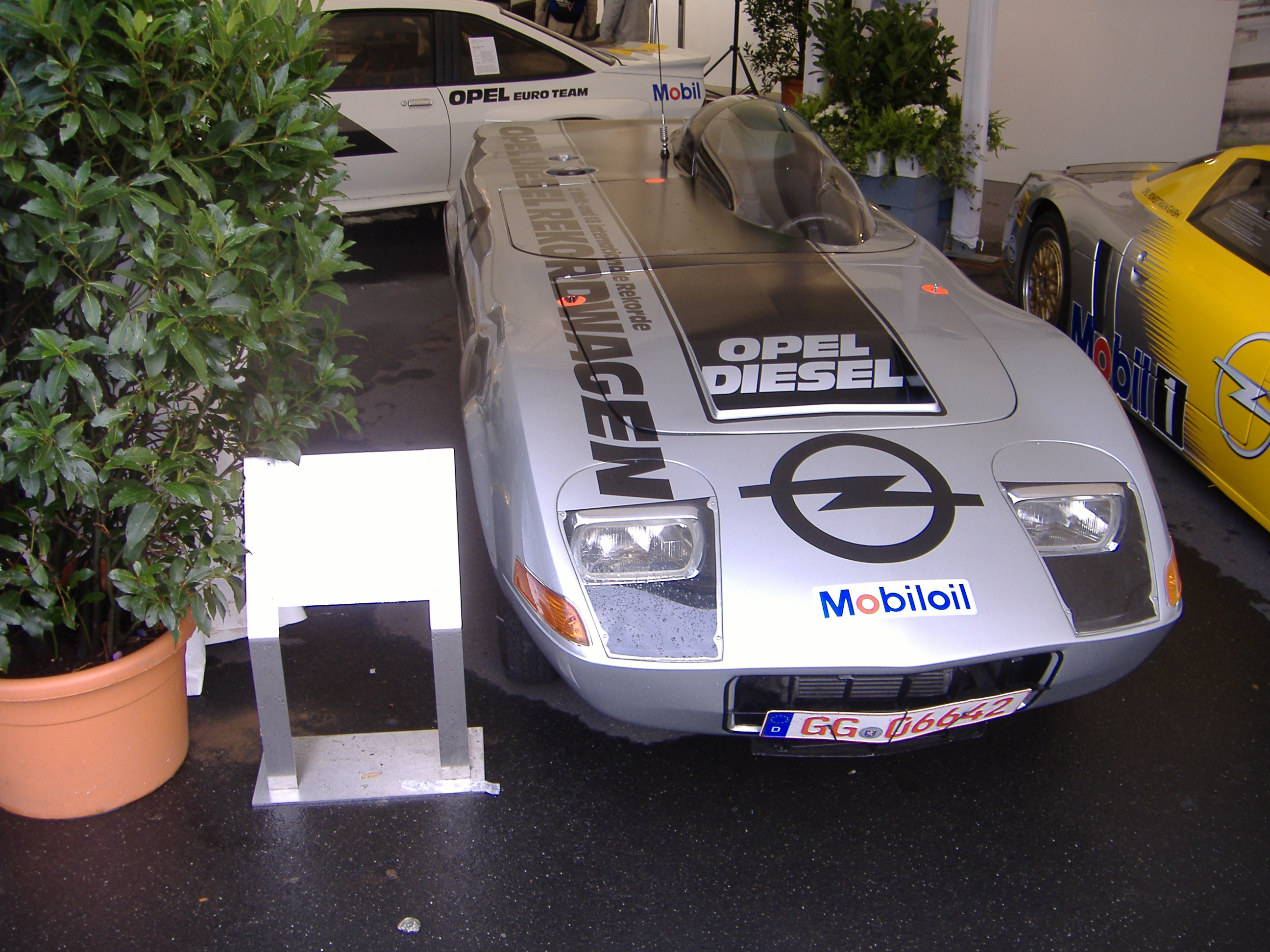 Opel Diesel GT Weltrekordfahrzeug, erreichte bei Versuchsfahrten 1972 197km/h, 18 internationale und 2 Weltrekorde für Dieselfahrzeuge. Fotografiert am 11. August 2006 beim AVD Oldtimer Grand Prix auf dem Nürburgring. Das Fahrzeug wurde an diesem Tag auch auf der Grand Prix Strecke gefahren.